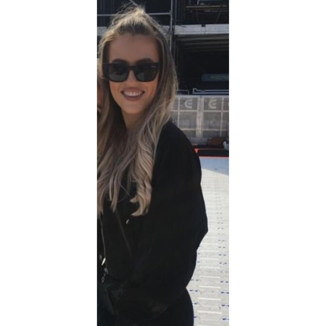 An image of Keilidh herself